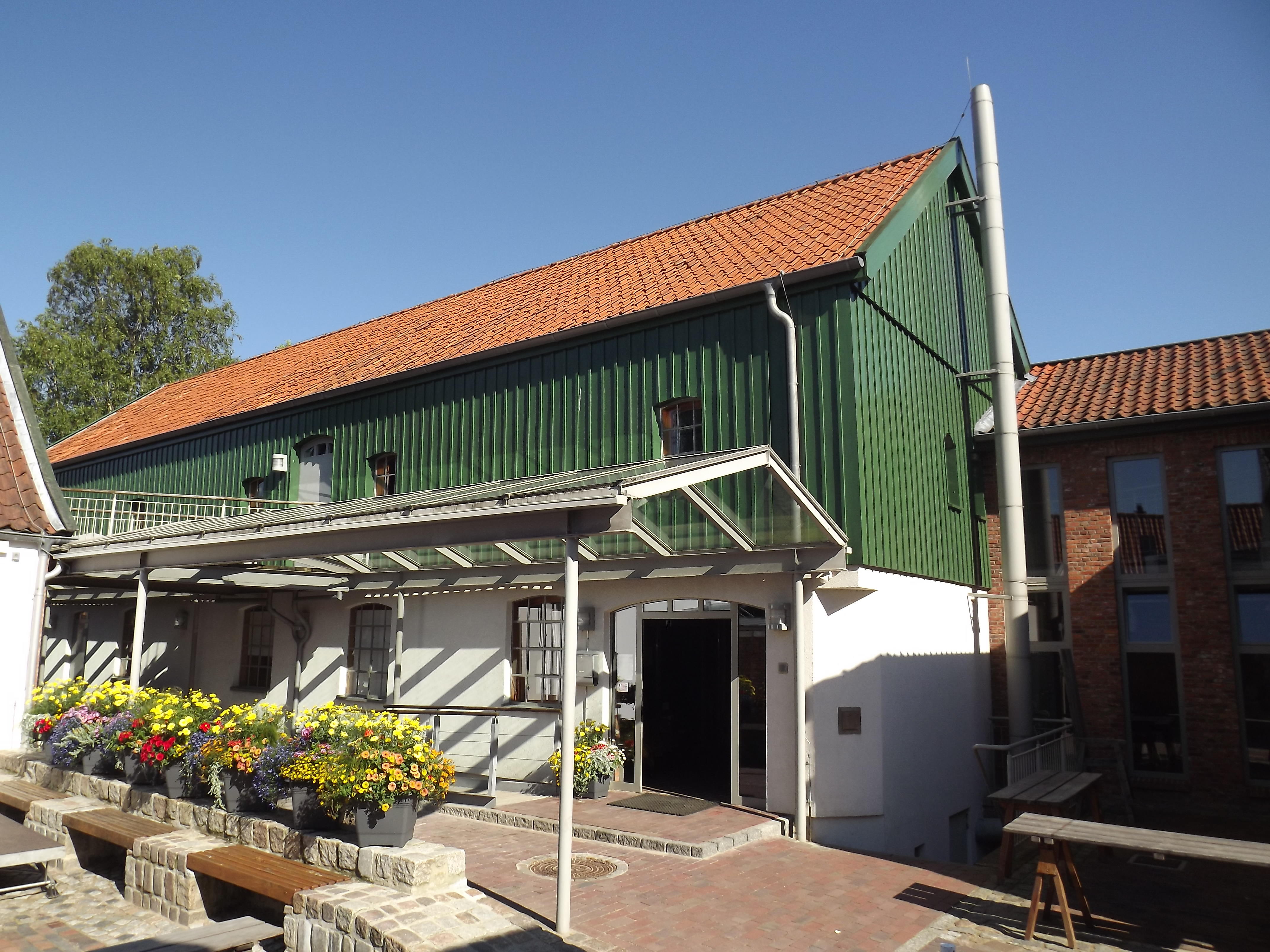 Die 1905 erbaute "Alte Schmiede" beherbergt einen Teil des Heider Heimatmuseums.